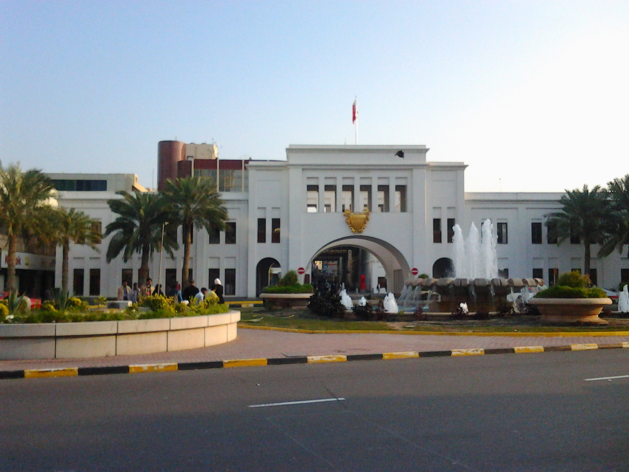 Budynek Bab al BAhrain -Brama Bahrainu w Manamie